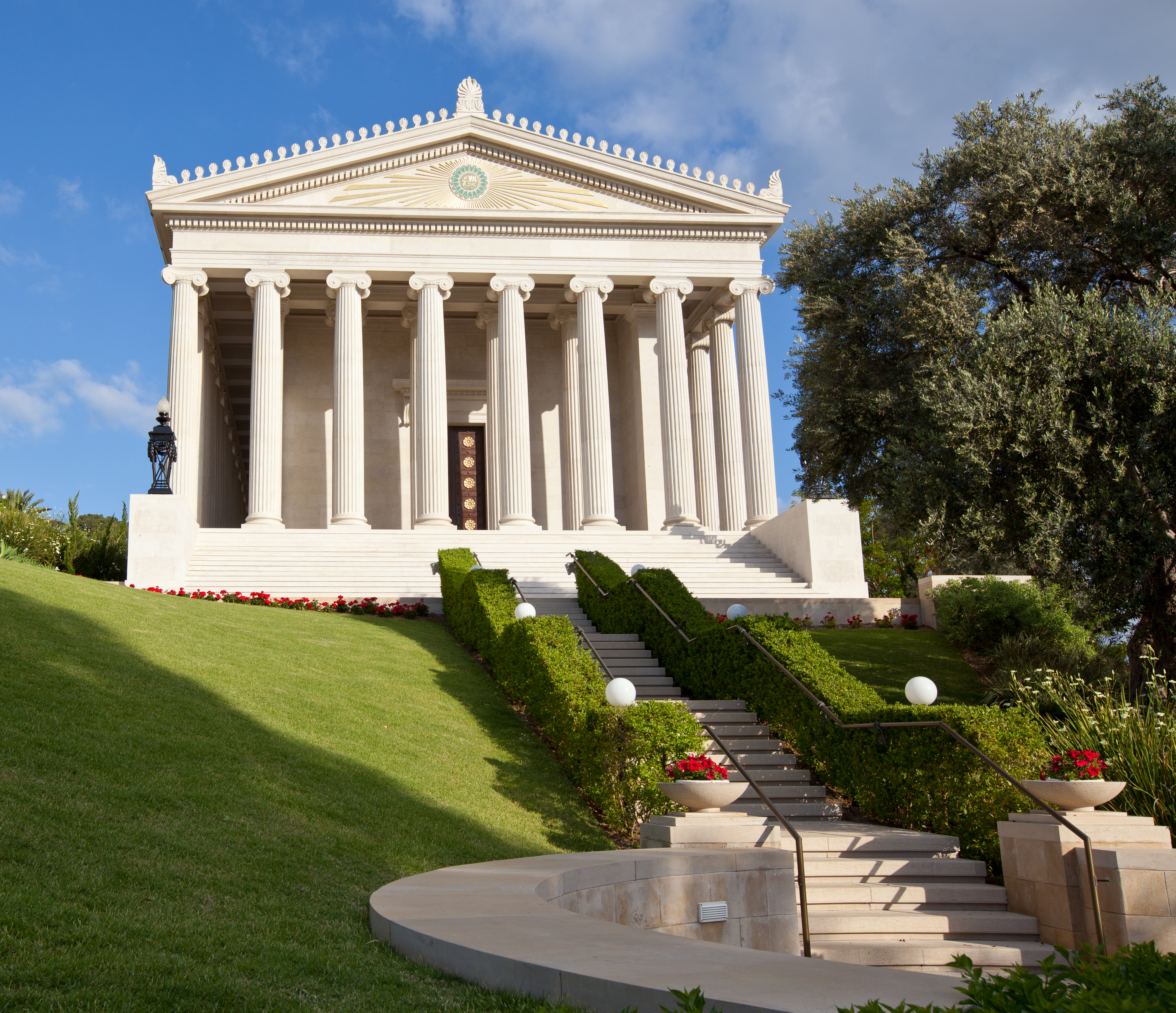 בנק המדיה הבהאי בחיפה.